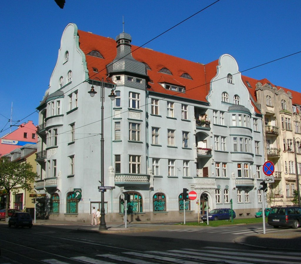 Kamienica ul. Mickiewicza 1 róg Gdańskiej w Bydgoszczy